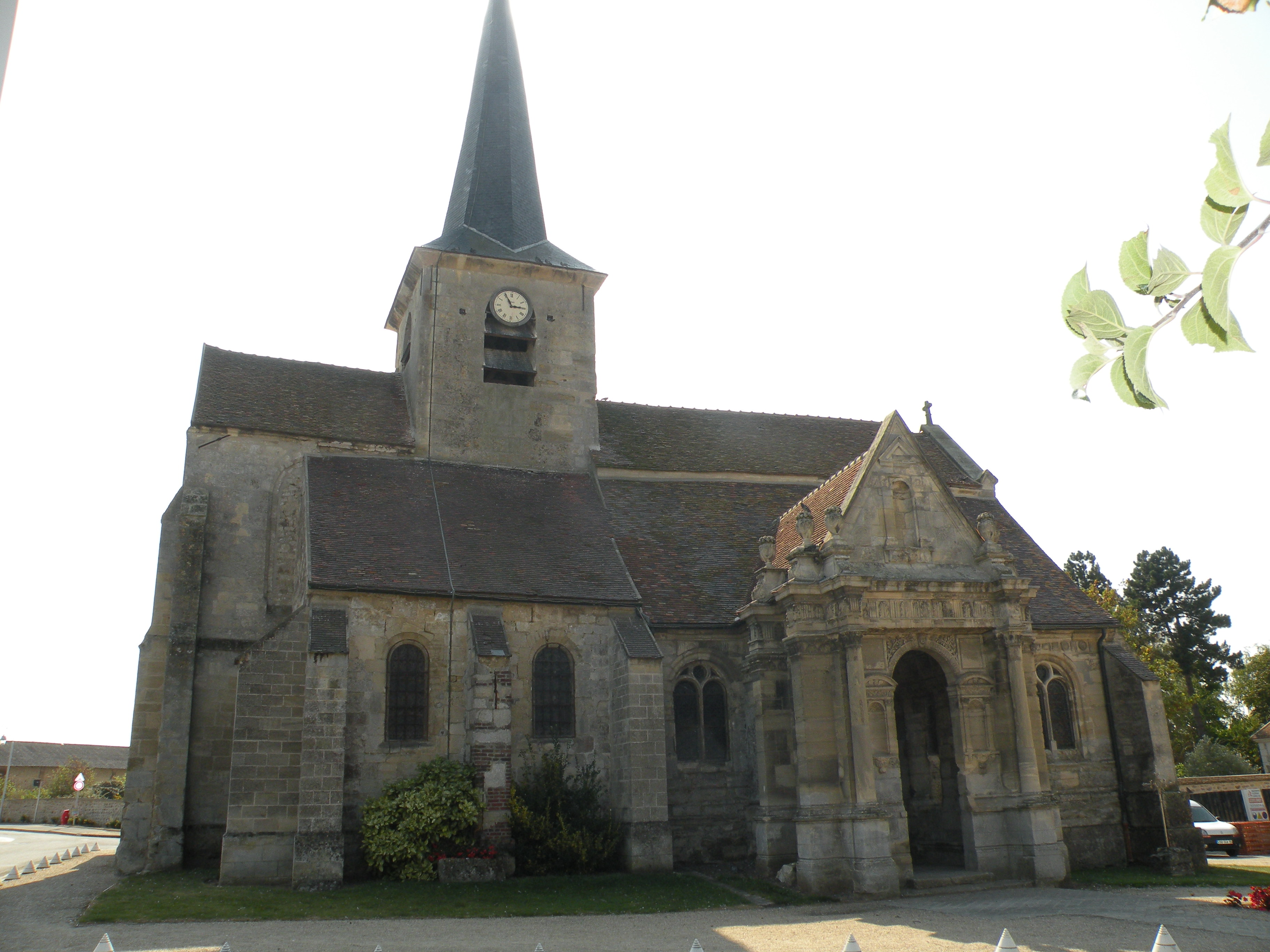 eglise de Livilliers, val d'oise